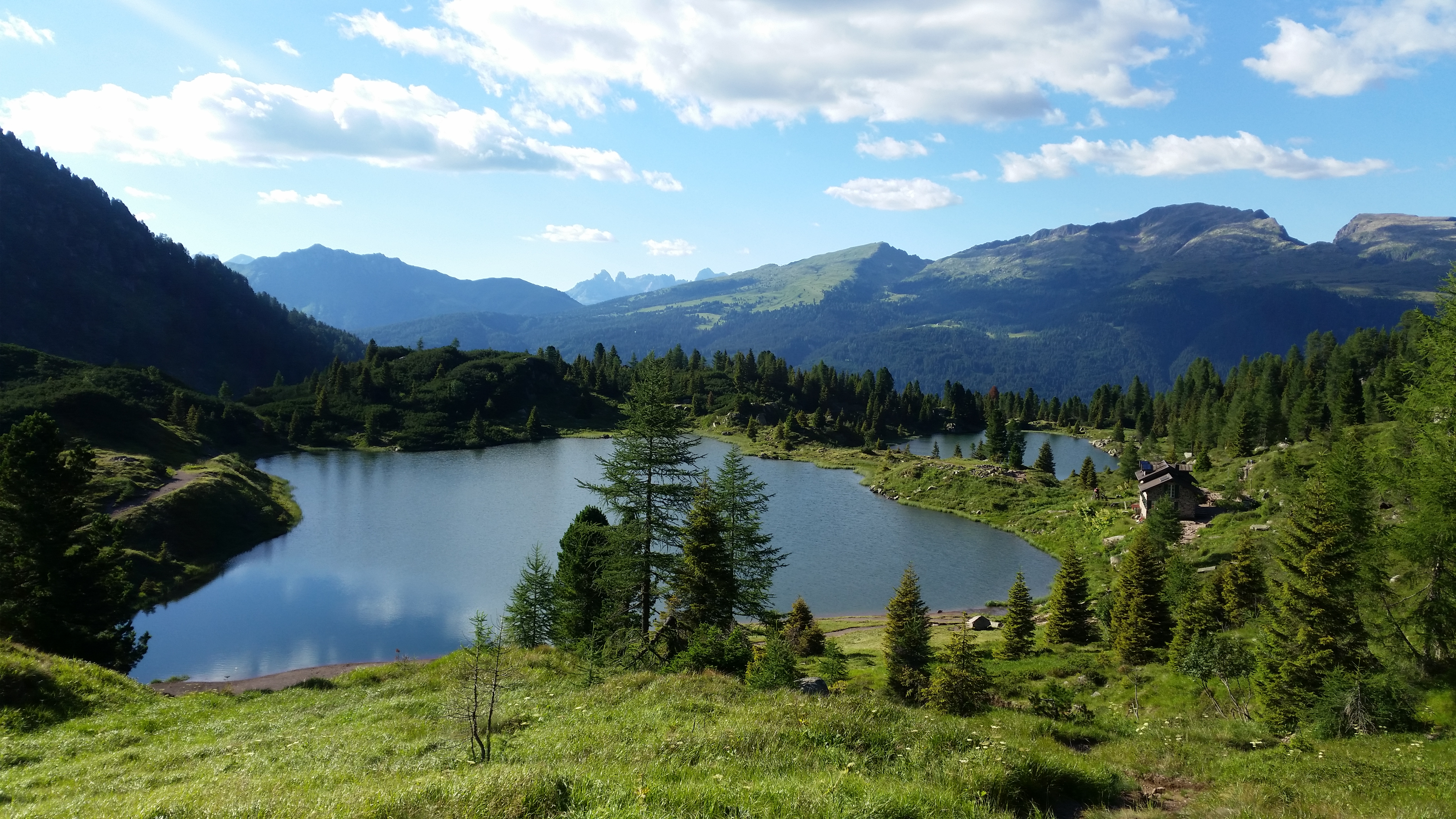 Vista dall'attacco sentiero per la cima Cavallazza